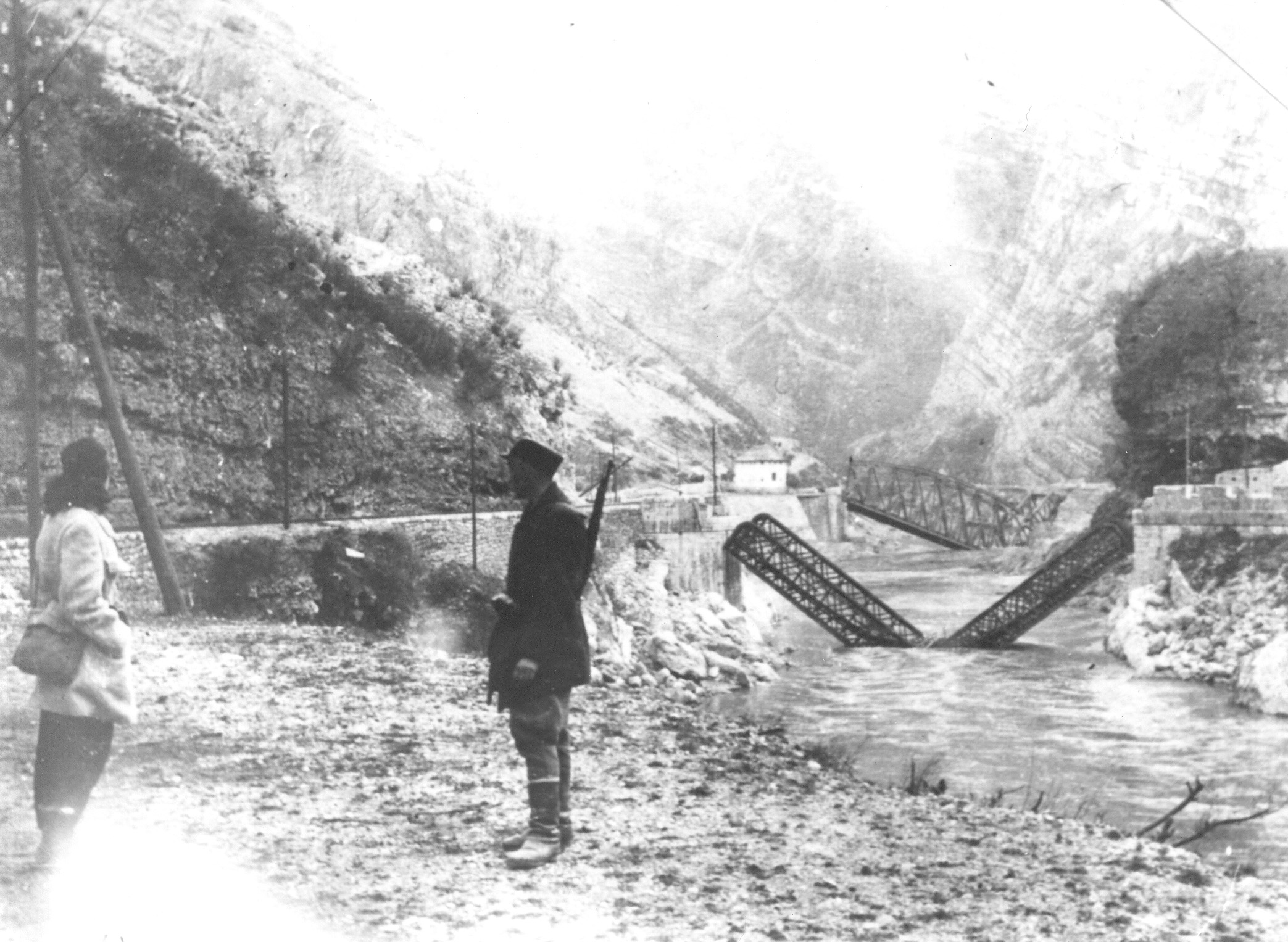 Srpskohrvatski / српскохрватски: Most na Neretvi u toku četvrte neprijateljske ofanzive 1943.